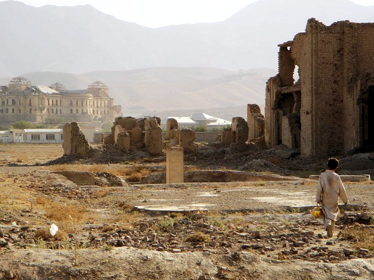 Im afghanischen Bürgerkrieg zerstörte Häuser im südwestlichen Kabuler Vorort Dih-i Dānā im Jahr 2004, im Hintergrund der Darul-Aman-Palast